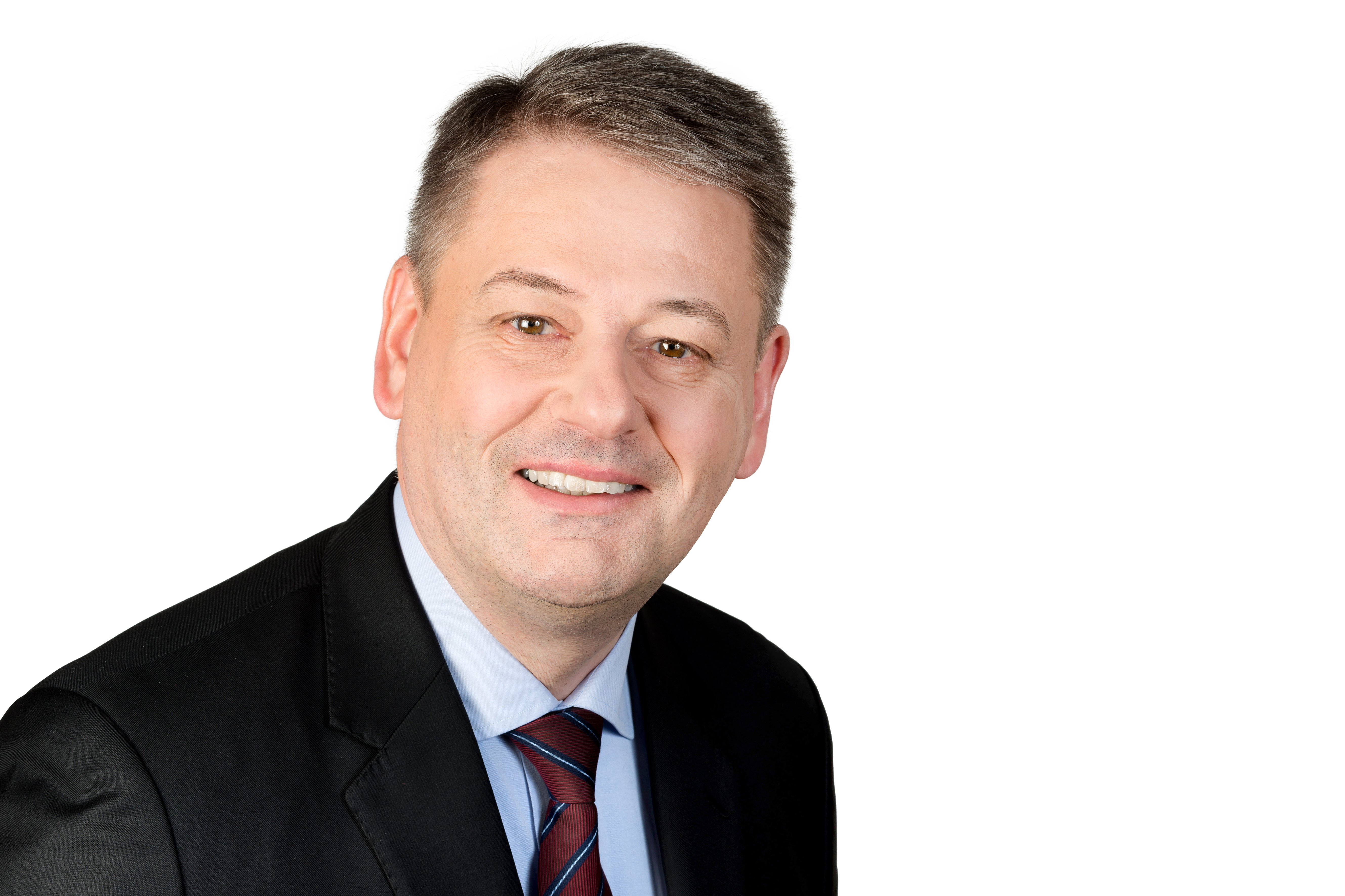 Andrä Rupprechter ist österreichischer Bundesminister für Land- und Forstwirtschaft, Umwelt und Wasserwirtschaft.